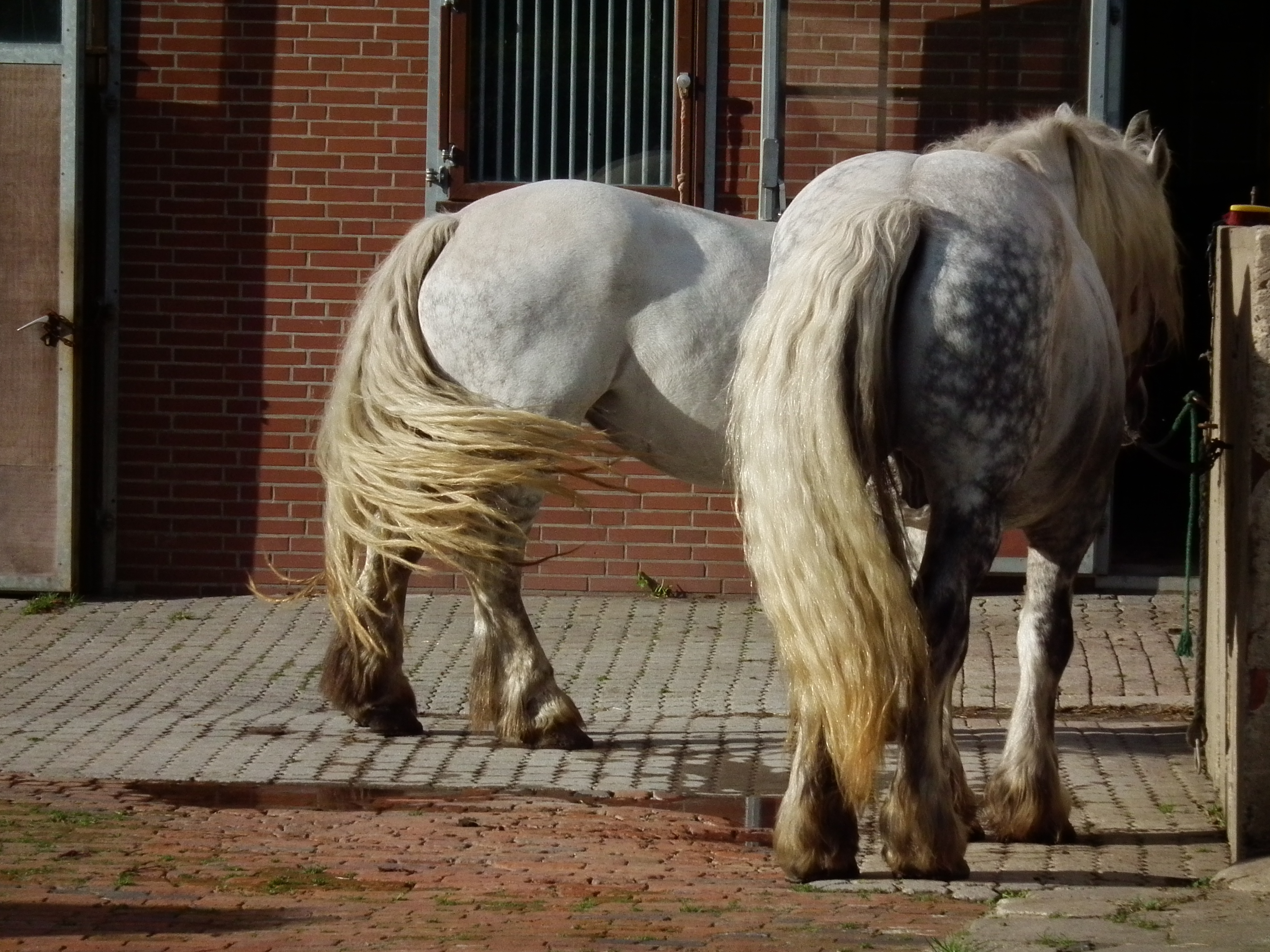 Schweif von Percherons, fotografiert auf der ostfriesischen Nordseeinsel Juist (Niedersachsen, Deutschland)